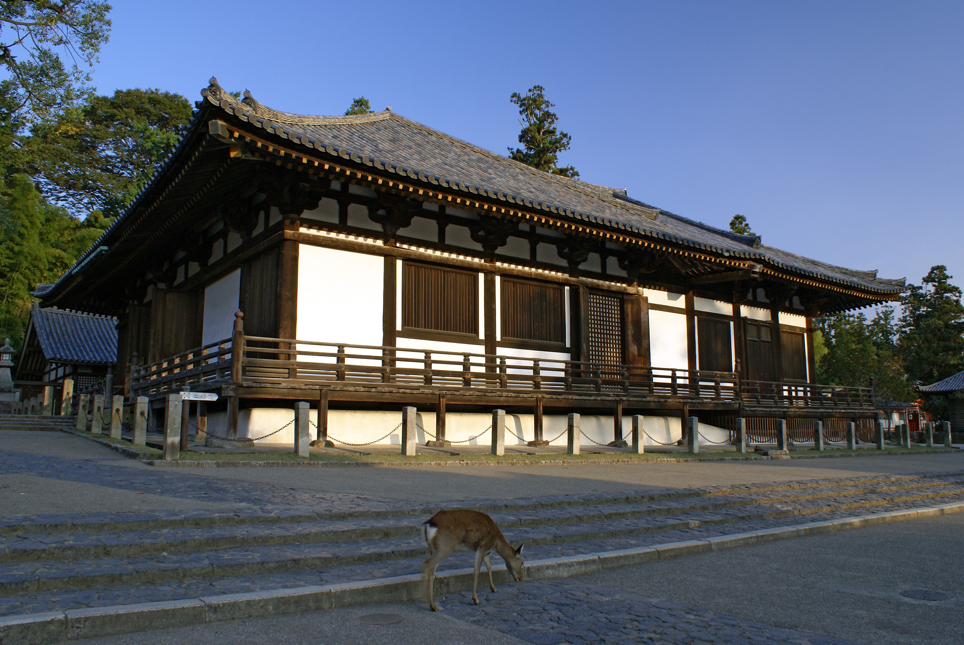 Tōdai-ji in Nara, Nara, Japan